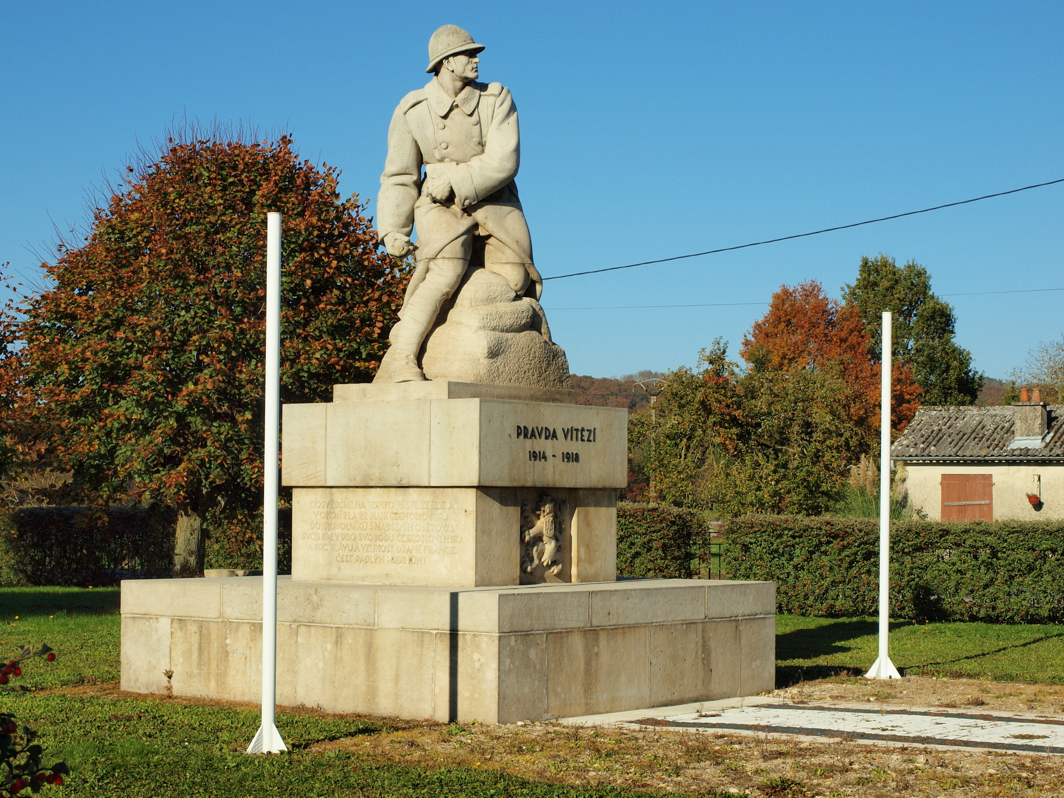 Monument de la Légion Tchécoslovaque à la Ferme de Bobot à Chestres (Vouziers, Ardennes, France)